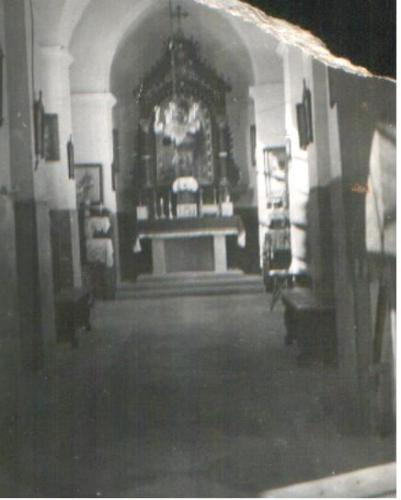 Wnętrze starego kościoła, w chwili obecnej zastapiony nowym.